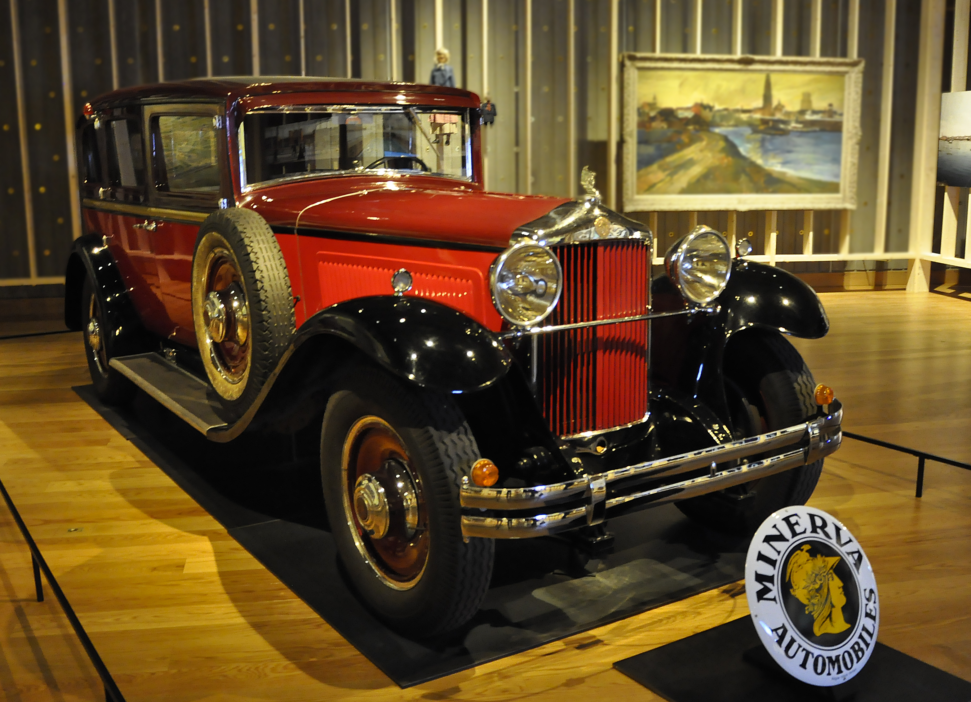 Een Minerva 17cv M6 type AR uit 1932 in het MAS te Antwerpen